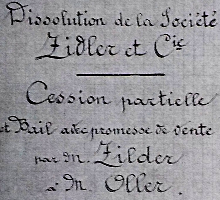 Le 9 septembre 1892, suite à un accident vasculaire cérébral invalidant, le fondateur du Moulin Rouge, Zidler, cède à Oller la totalité de sa part sur " la clientèle et achalandage " du cabaret, ne conservant que la moitié de la propriété foncière. Ce document de 110 pages (Archives nationales, Minutier central, XXXVIII/1319) atteste bien que le réel fondateur du Moulin Rouge en 1889 fut Zidler.